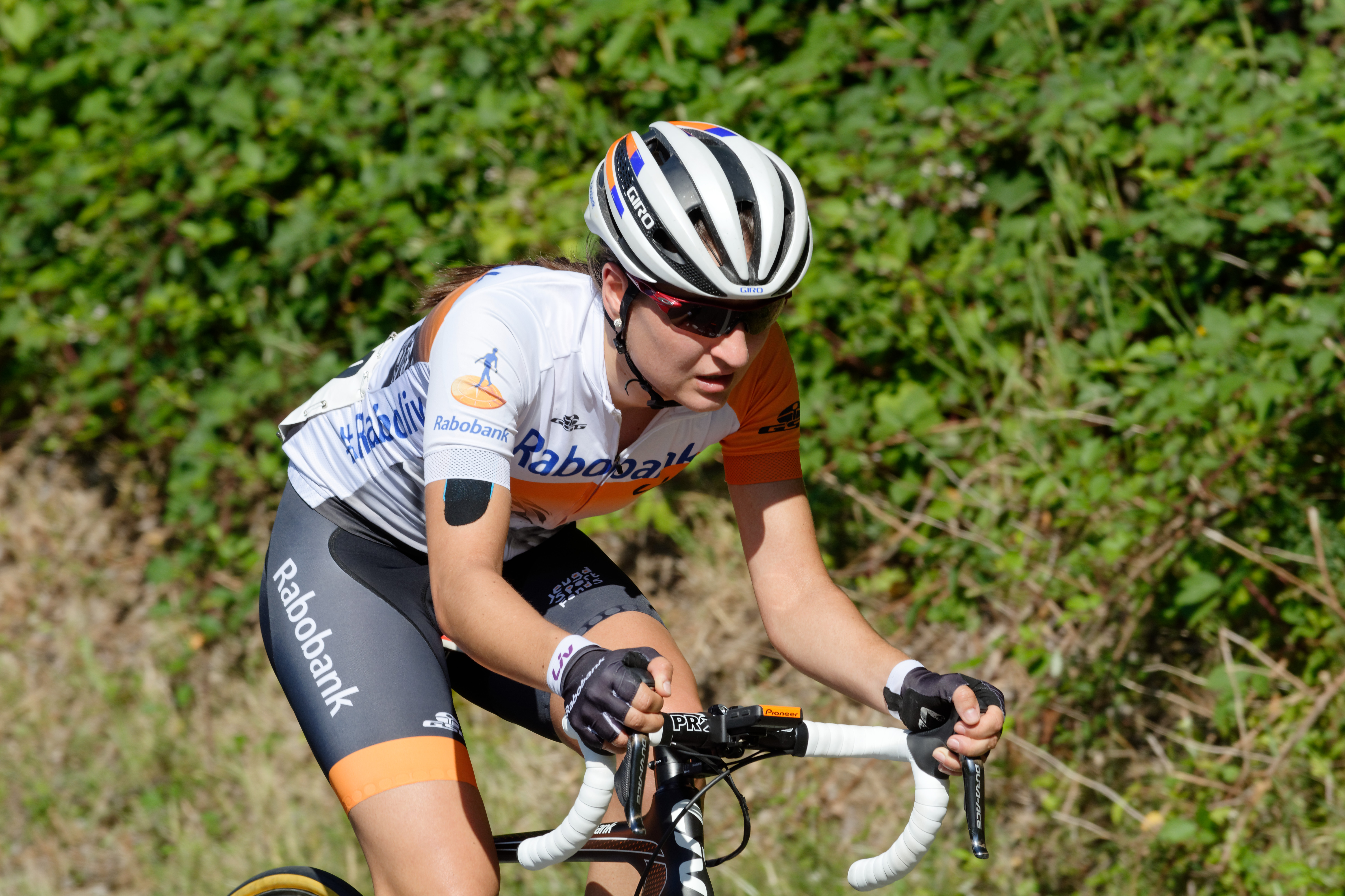 D71_0619_DxO